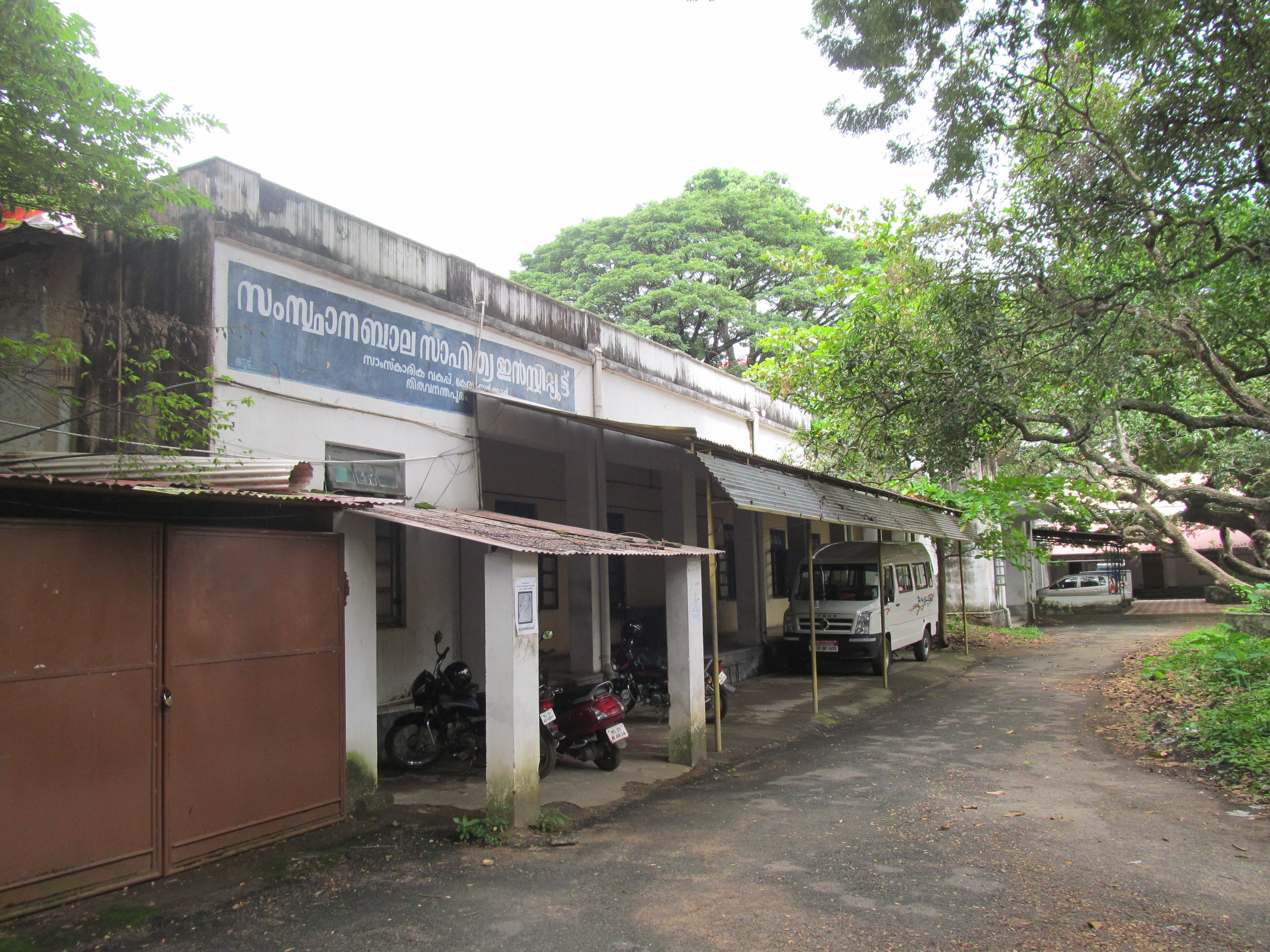 കേരള സംസ്ഥാന ബാലസാഹിത്യ ഇന്‍സ്റ്റിറ്റ്യൂട്ട് - ഓഫീസ് സമുച്ചയം